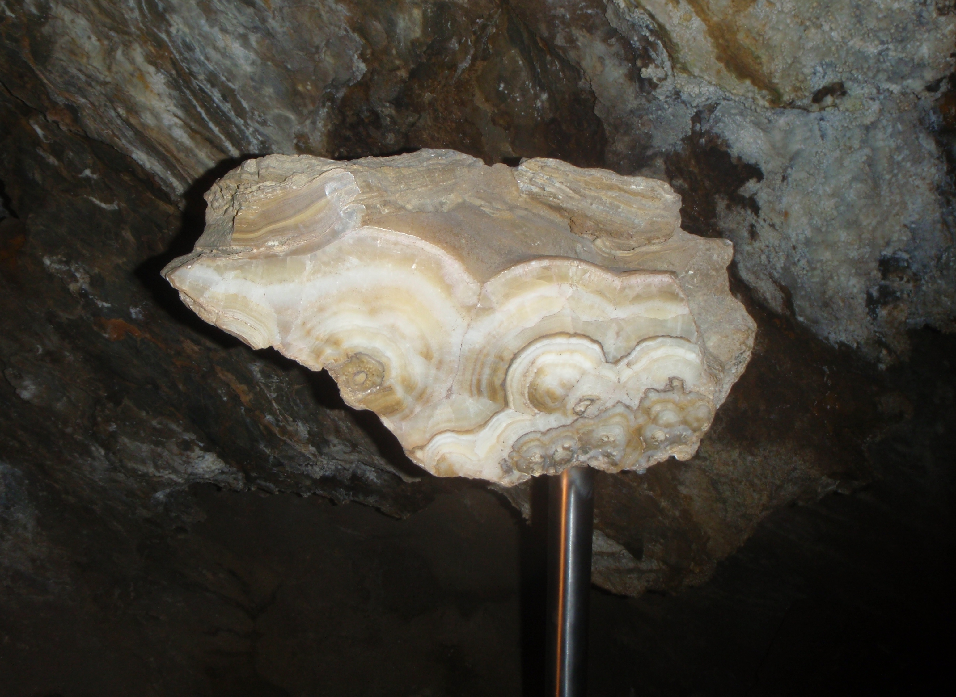 Podélný řez kalcitovou výzdobou ve Zbrašovských aragonitových jeskyních